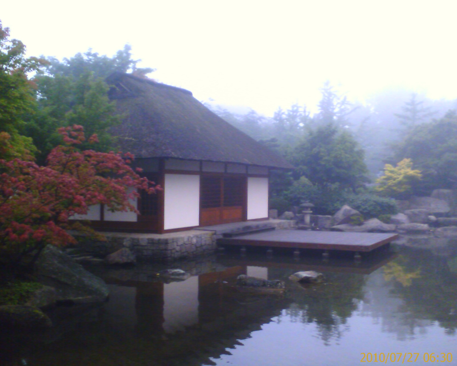 Teehaus im japanischen Garten, Herbst 2010 mit Blick vom Teich